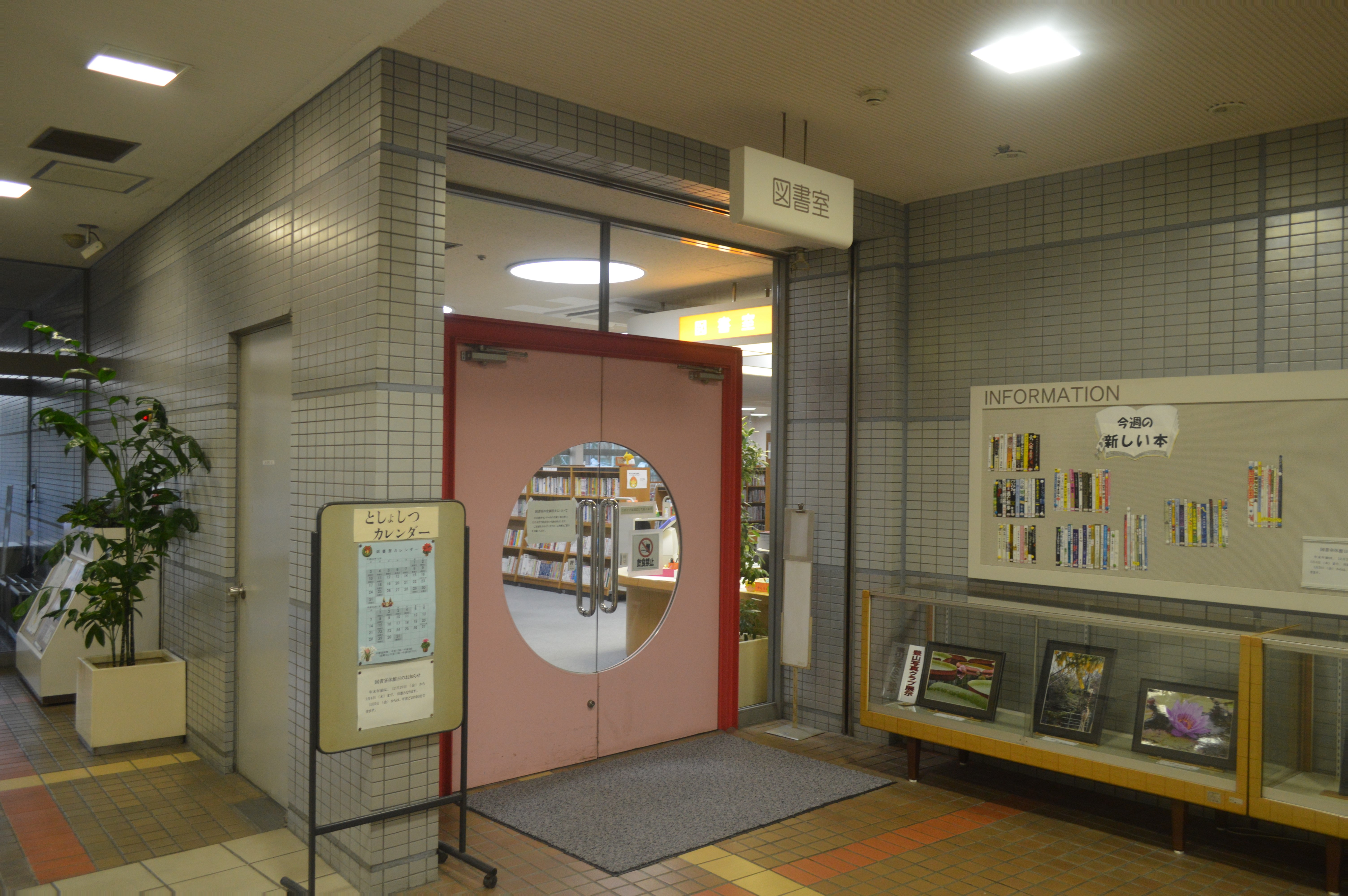 豊山町社会教育センターの1階にある豊山町社会教育センター図書室の入口。